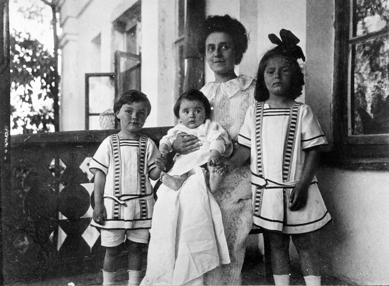 Татьяна Шлёцер с детьми: Ариадна, Юлиан, Марина (на руках). лето 1912 (?)